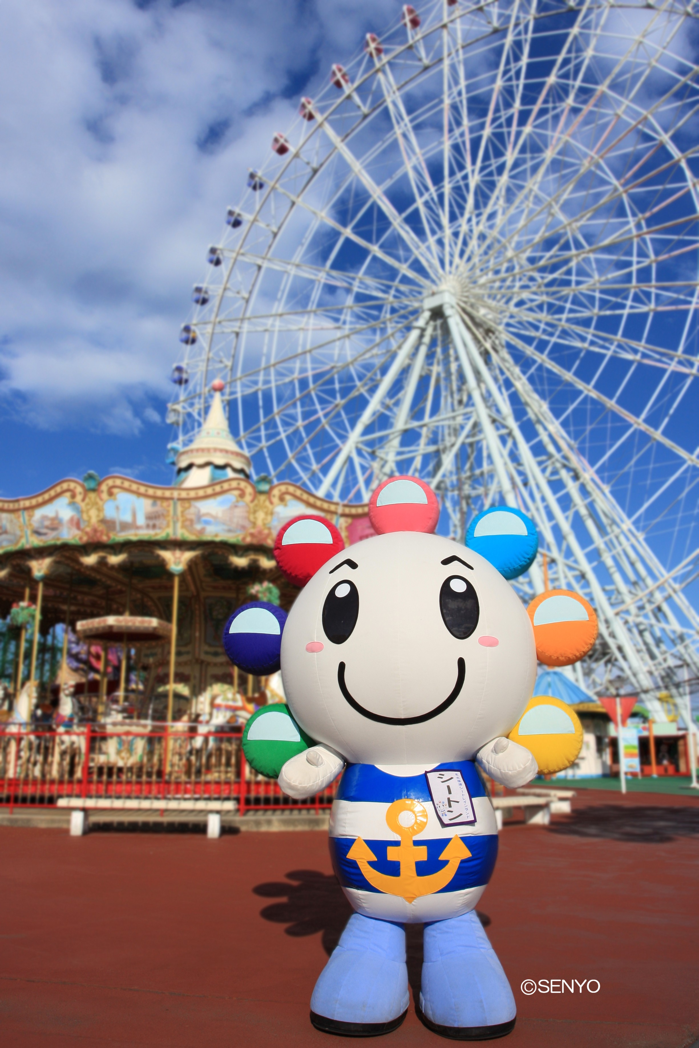 名古屋港シートレインランドとシートンくん